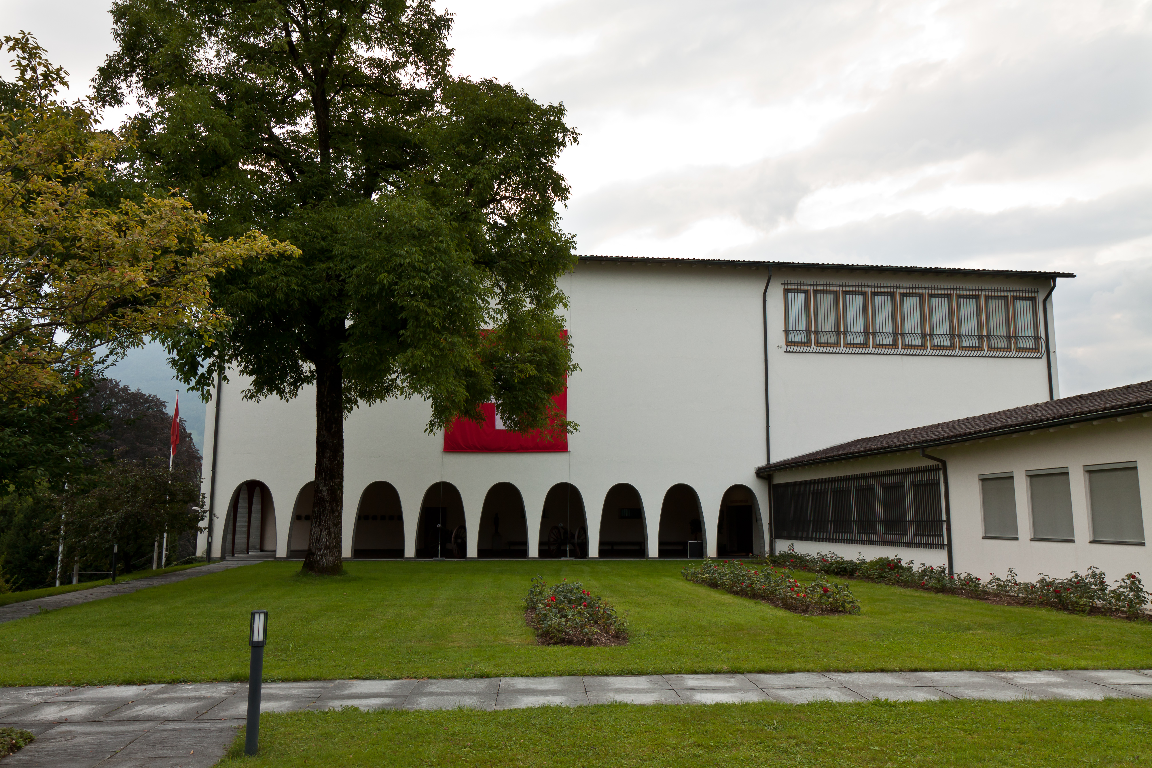 Bundesbriefmuseum (bis 1991 Bundesbriefarchiv), Schwyz